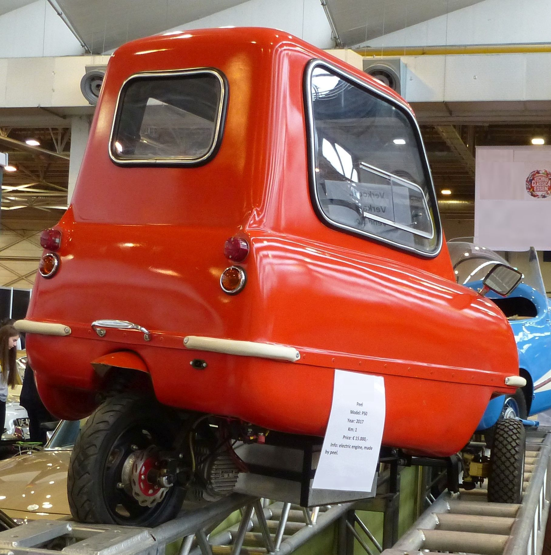 Peel Engineering P 50 2017 (Elektro)